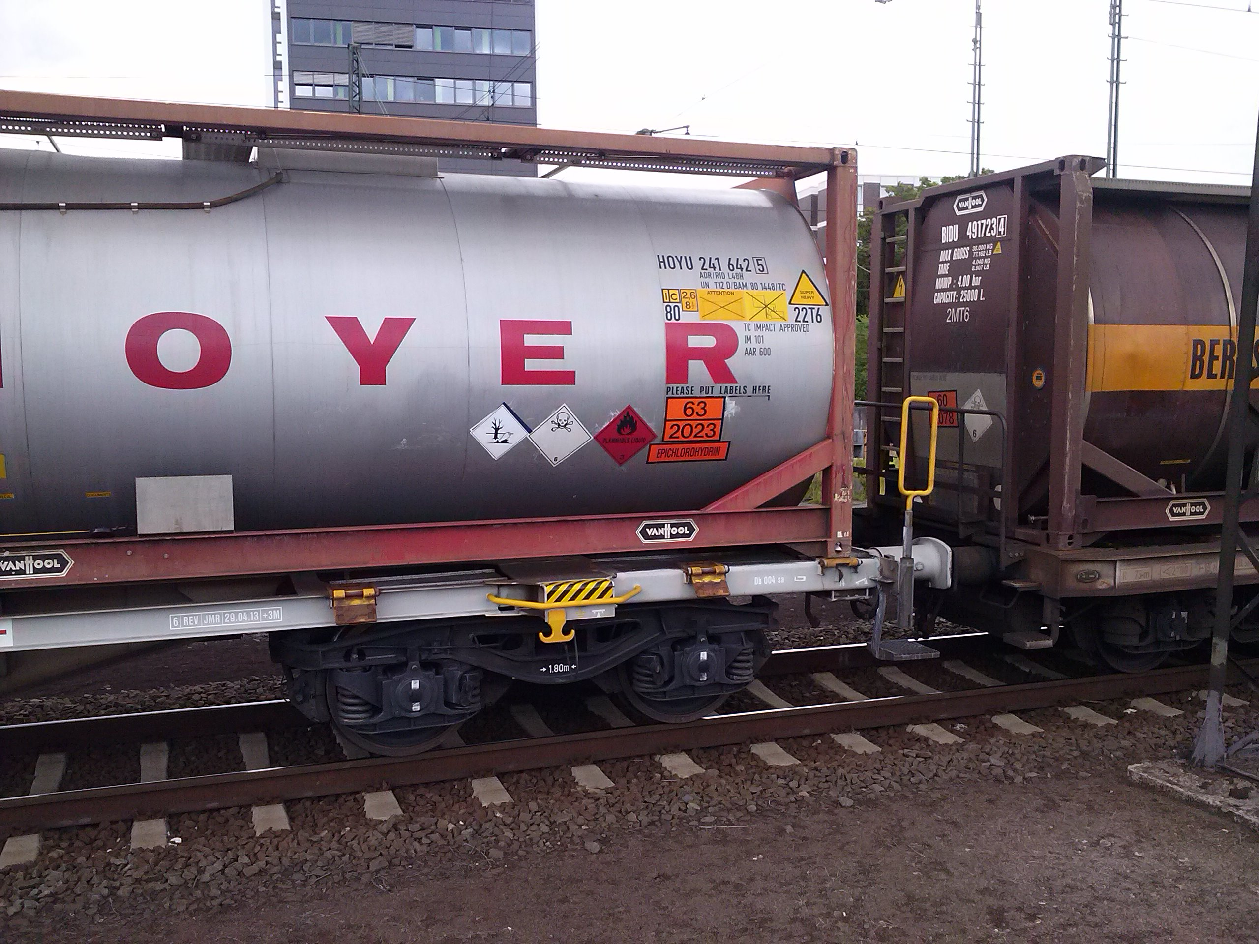 Tankcontainer mit Epichlorhydrin im Darmstädter Hauptbahnhof